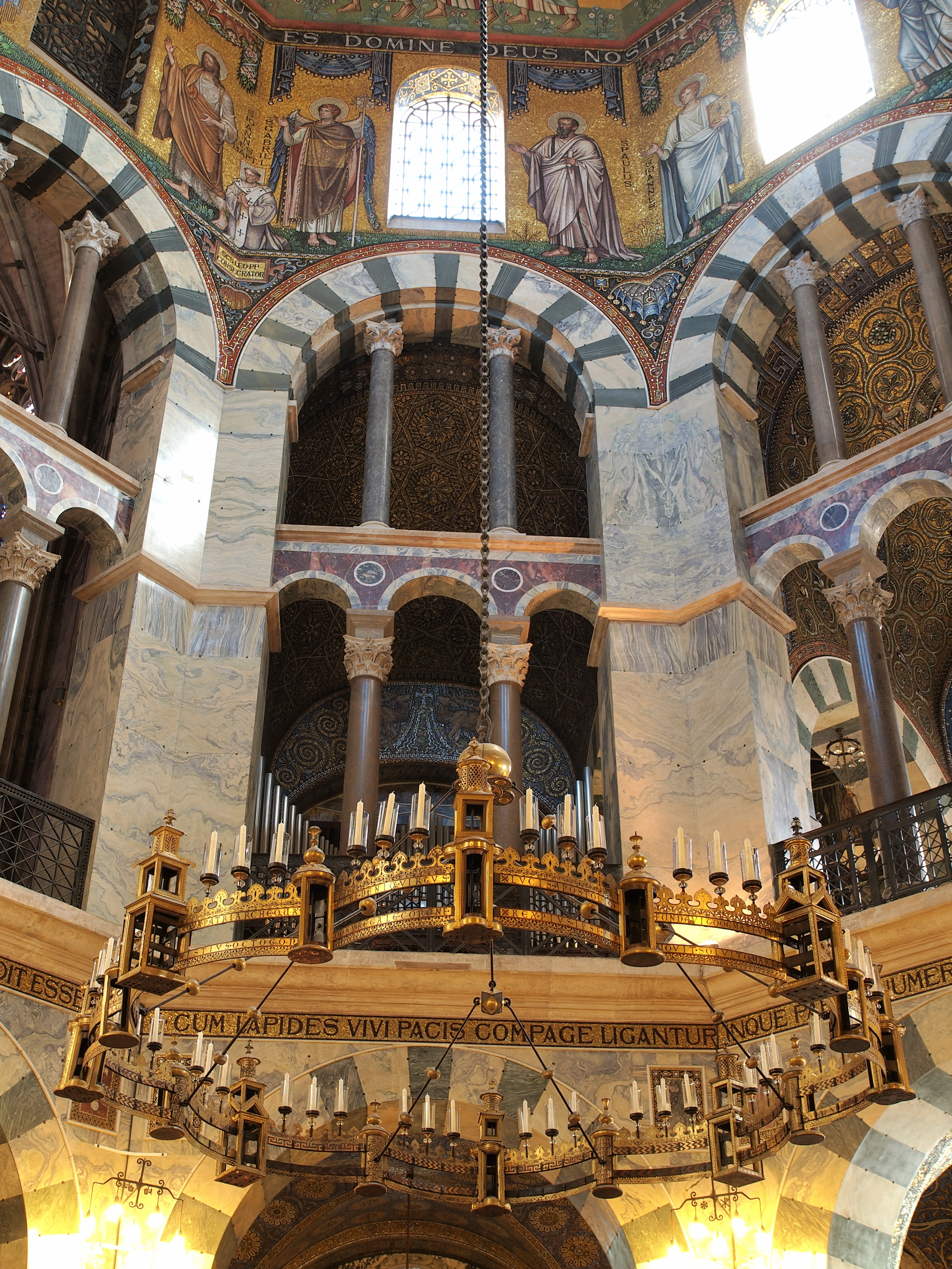 Barbarossaleuchter im Dom in Aachen, Denkmal